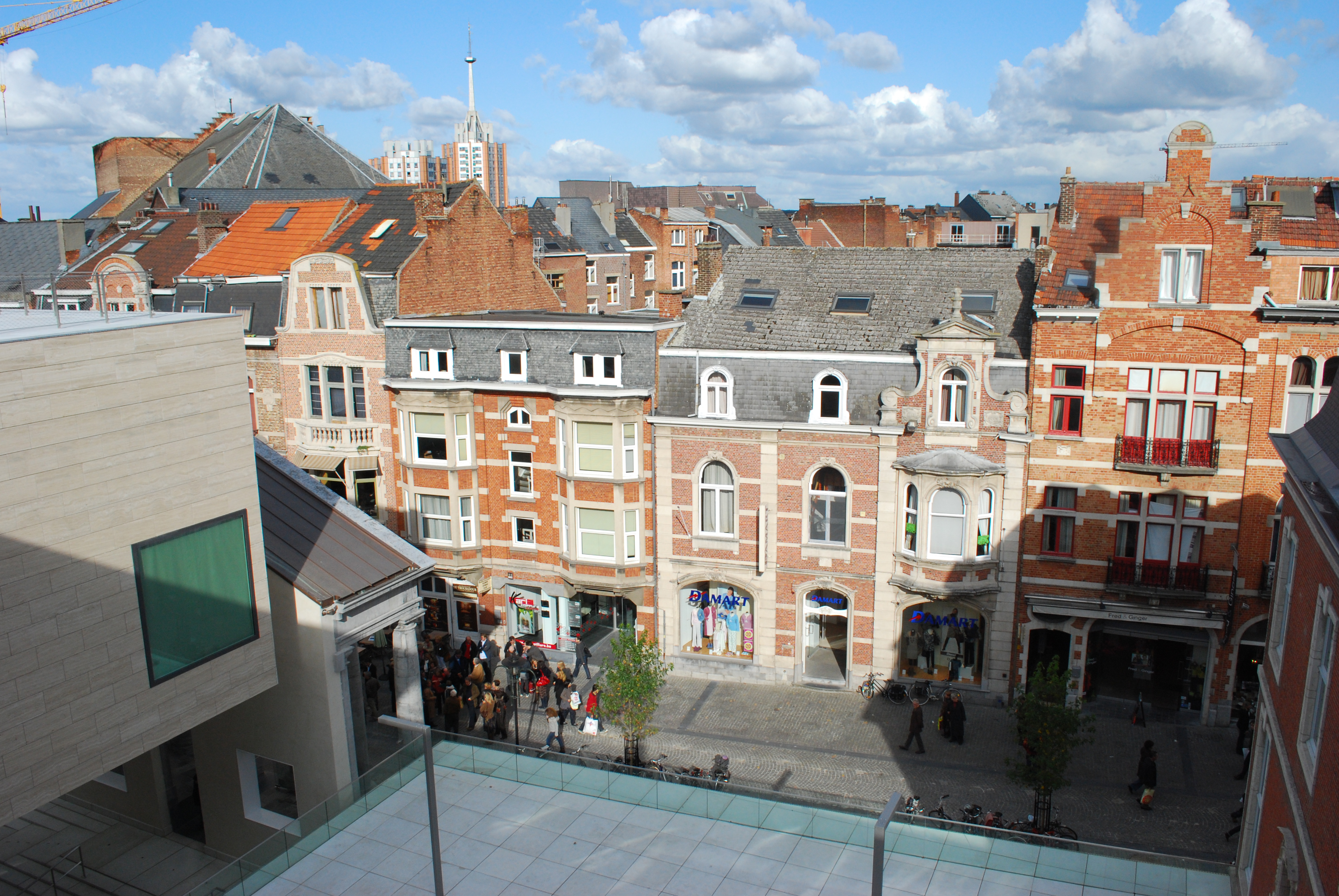 Vue de Leuven (Belgique).